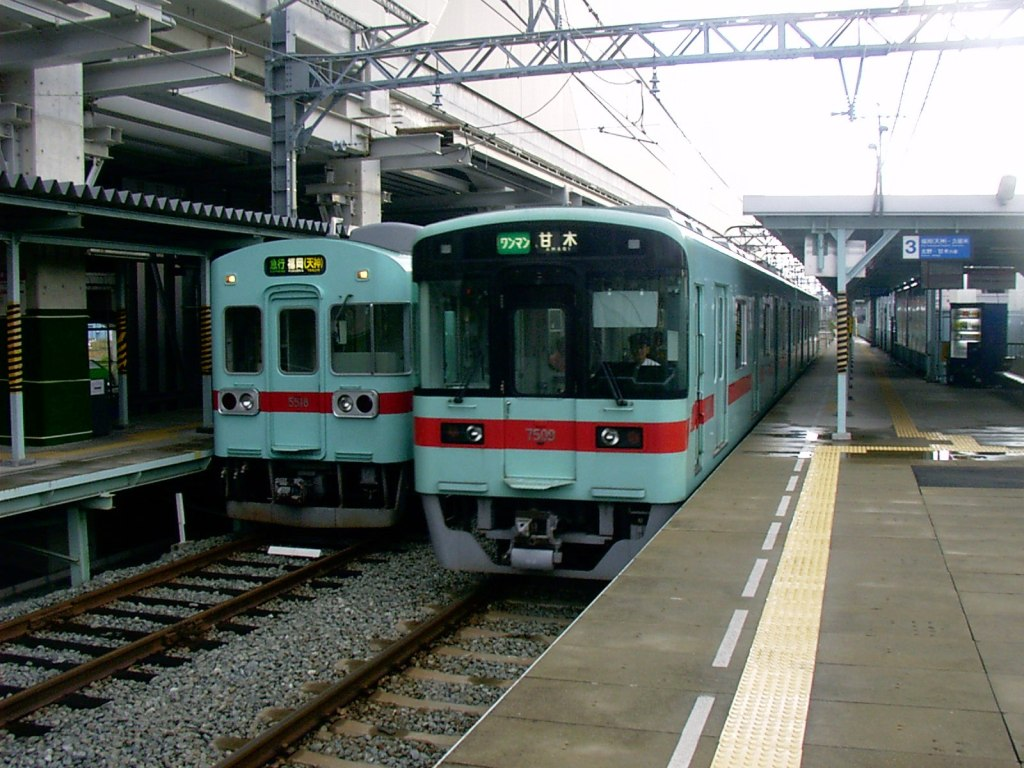 西鉄大牟田線花畑駅